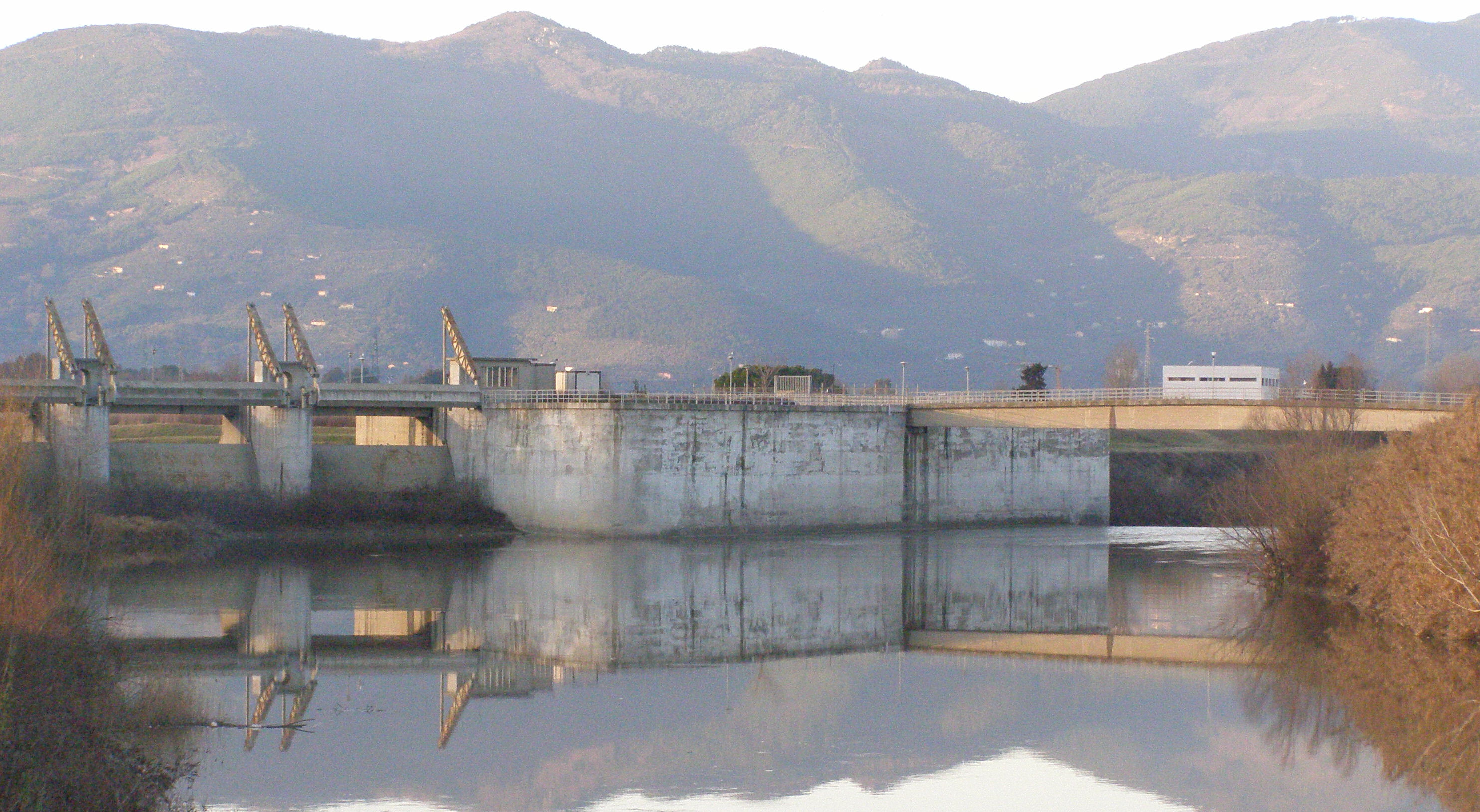 Scolmatore